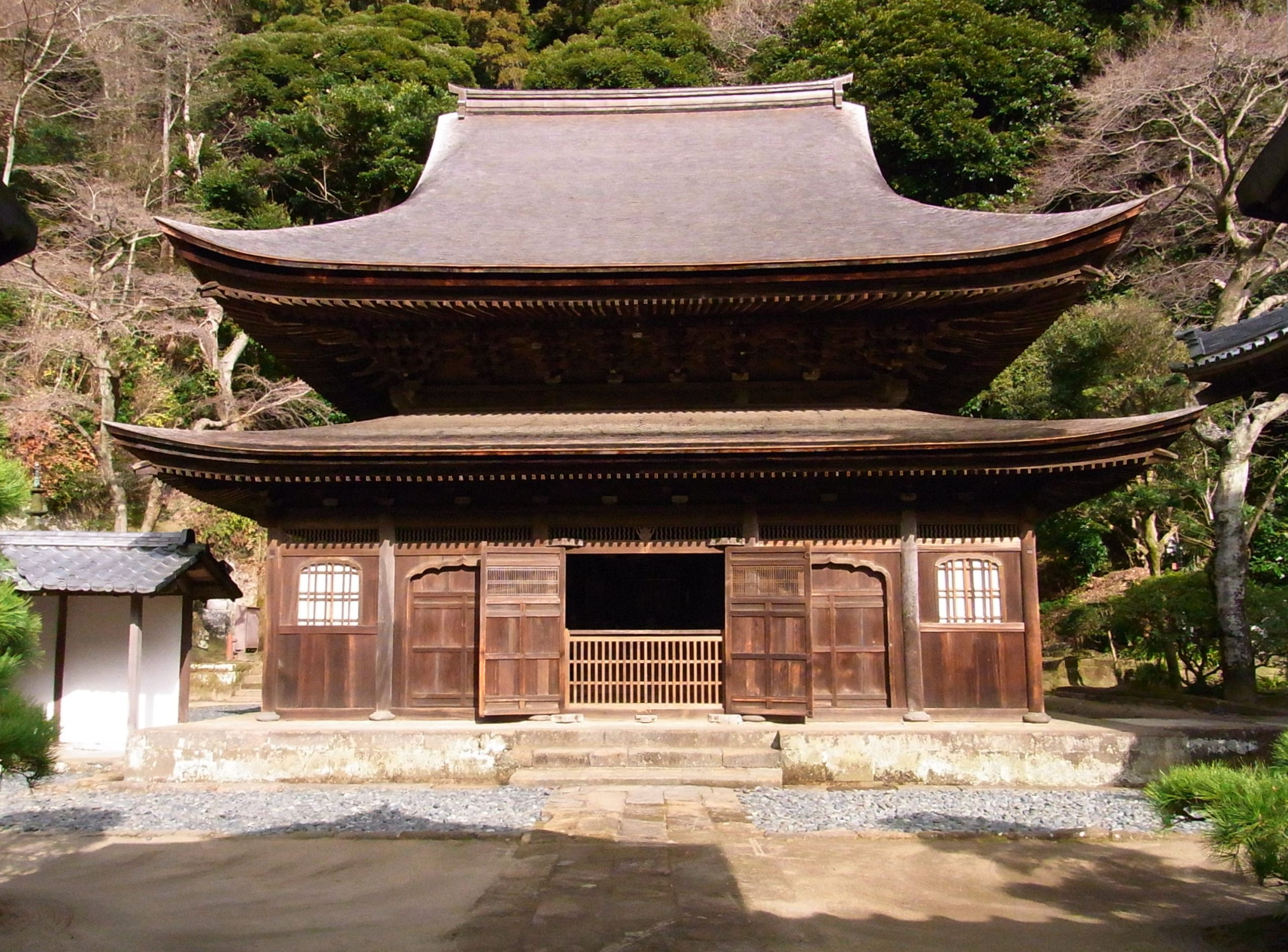 円覚寺正読院